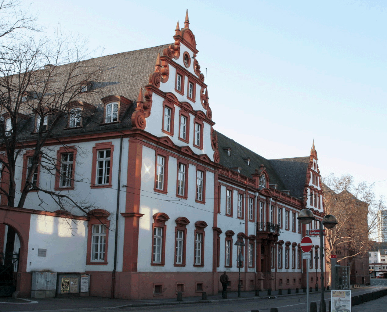 Schönborner Hof; dreiflügeliger Walmdachbau mit dreigeschossigen Rollwerkgiebeln, 1668–70, Architekt Clemens Hinck